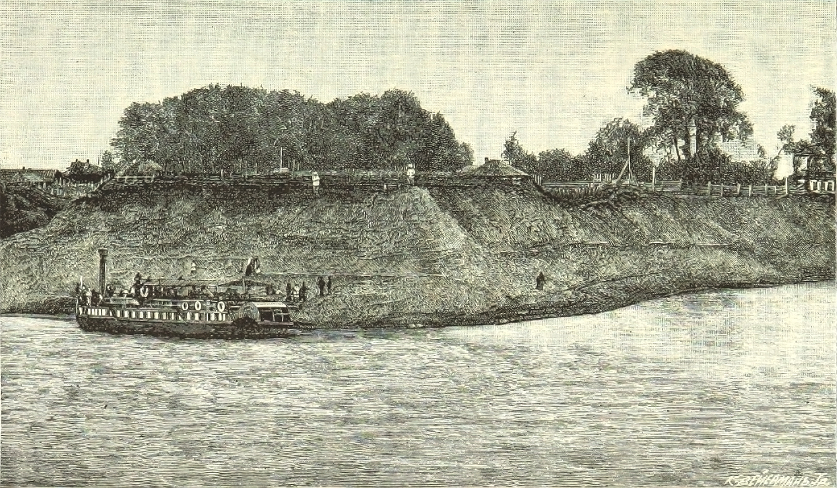 Беларуская (тарашкевіца): Сураж (Suraž), рака Дзьвіна (Dźvina)